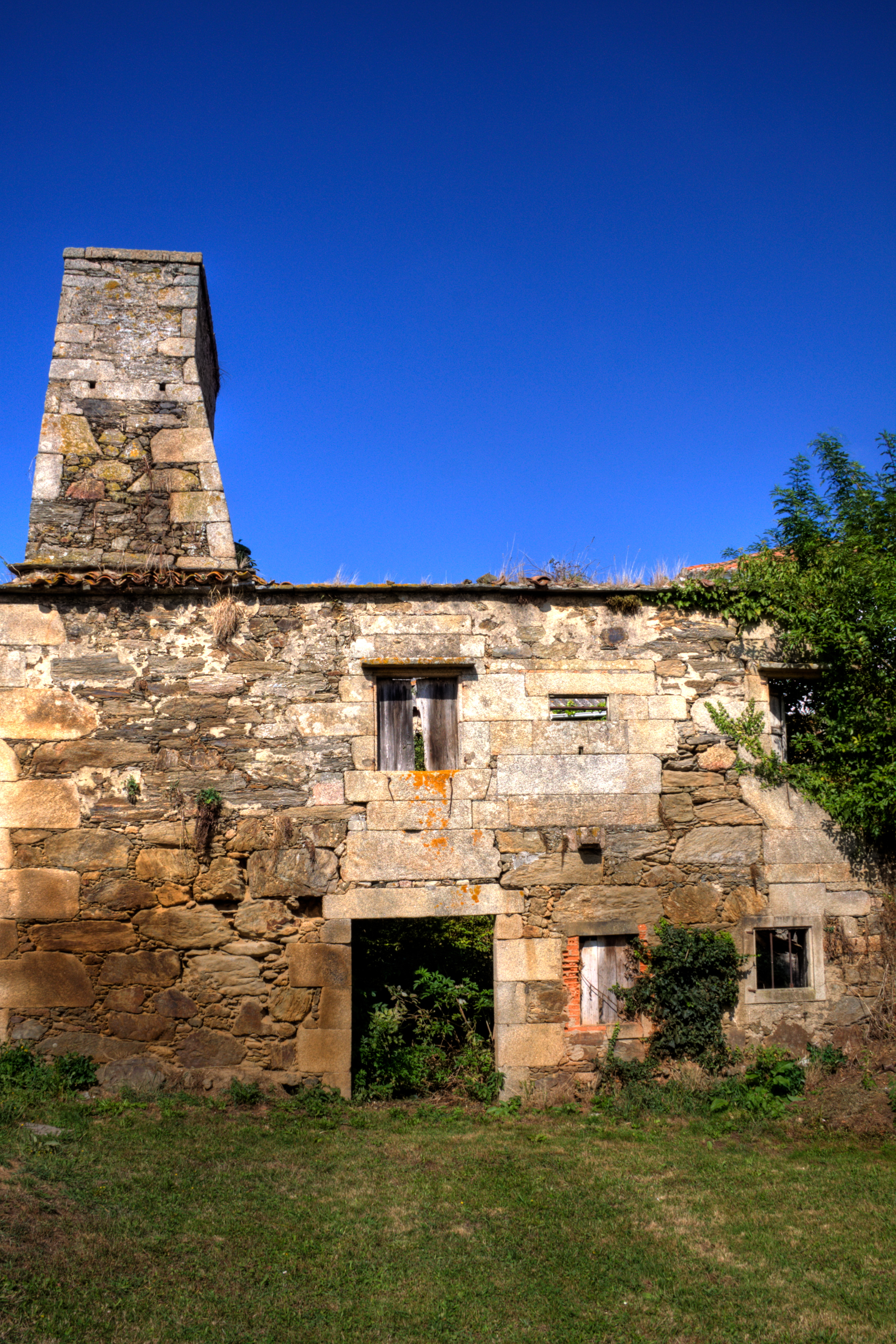 Ruinas de la Torre de Andeiro - Cambre (A Coruña)